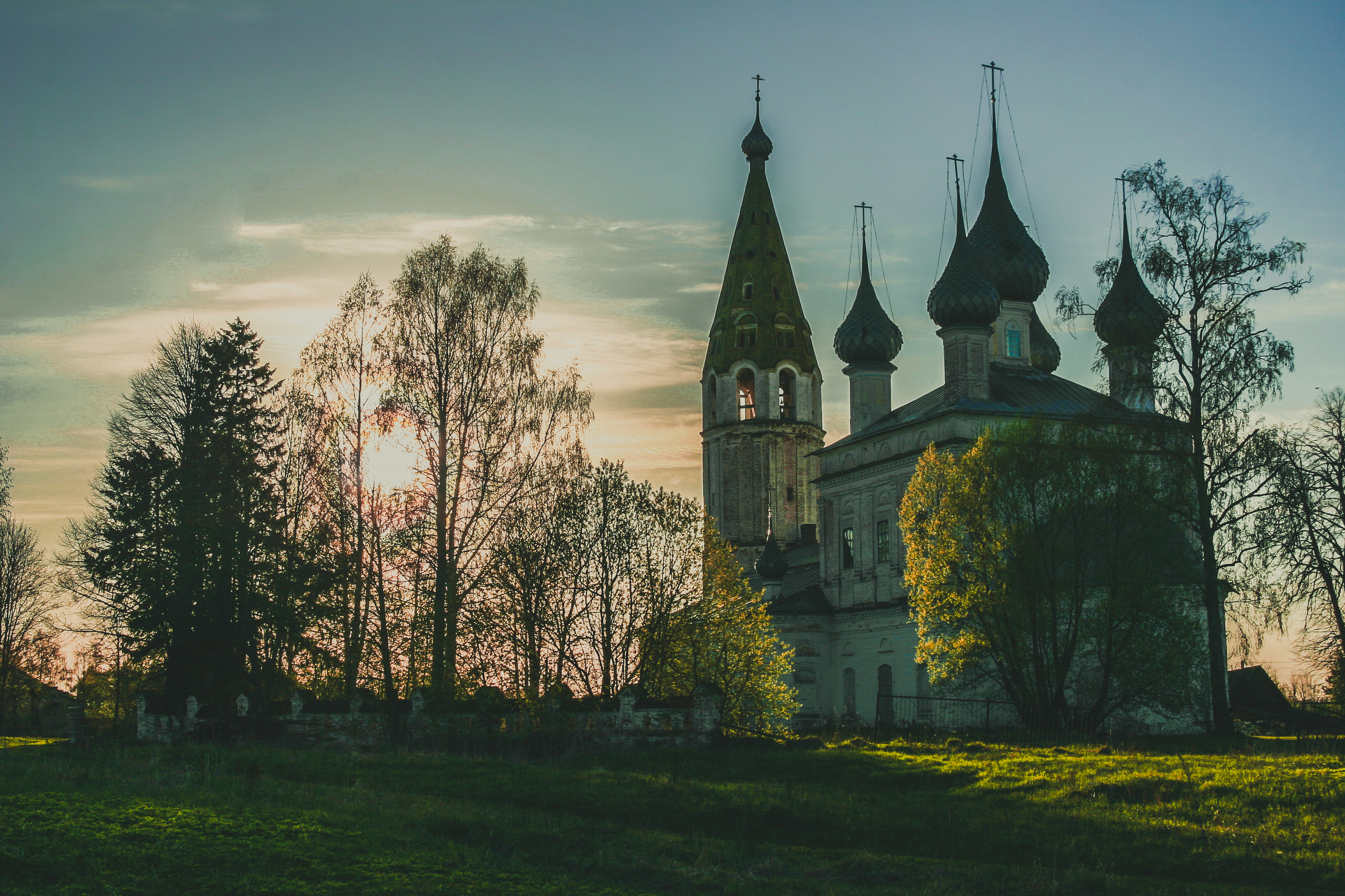 казанская церковь с интерьером: Кощеево, Родниковский район, Ивановская область